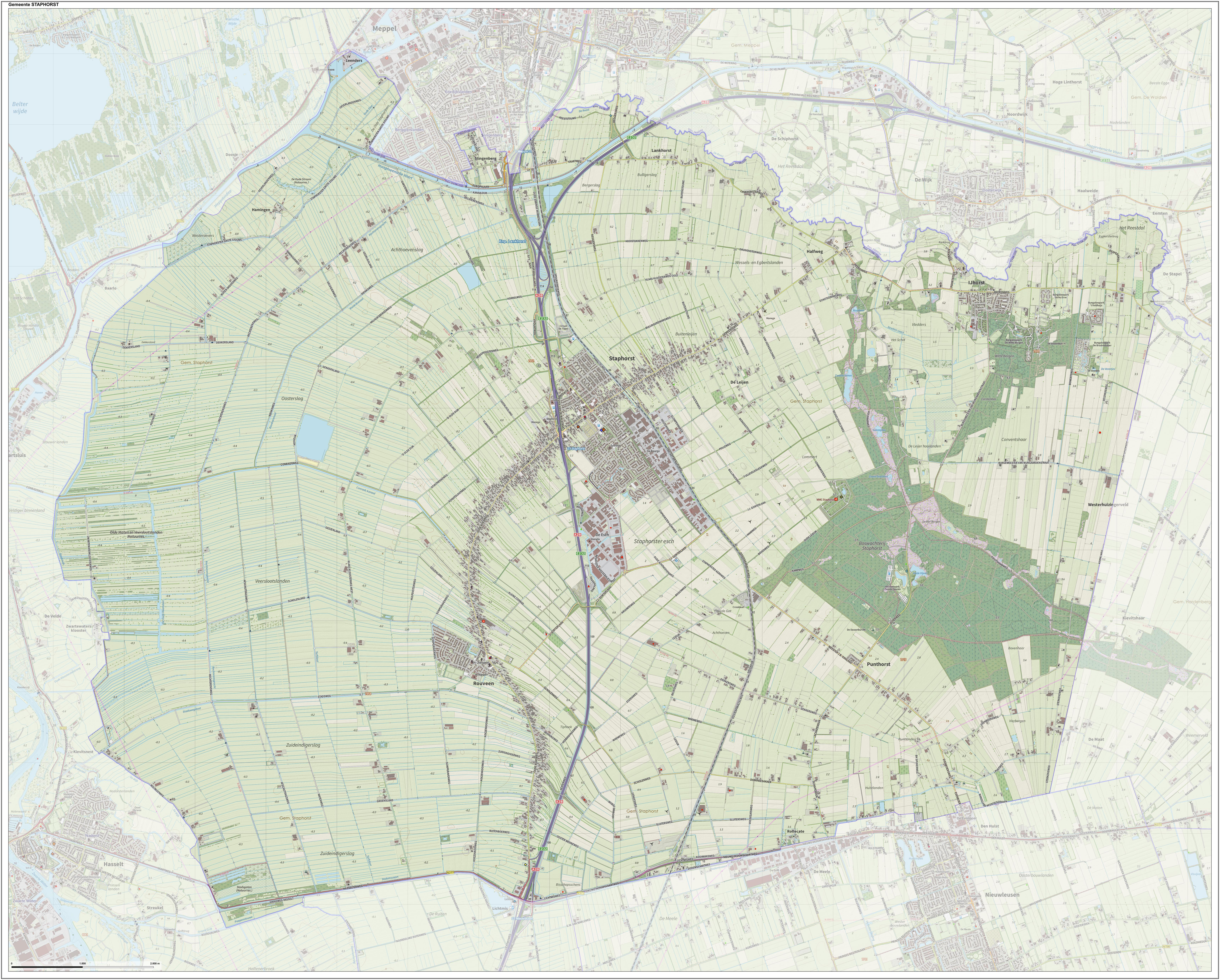 Topografische gemeentekaart. Resolutie: 400 pixels/km. Kaartbeeld samengesteld uit de open geodata van de Top10NL en Top25namen (Kadaster), Creative Commons-BY licentie. Gebouwvlakken uit open geodata BAG extract. Wegen uit de OpenStreetMap, OpenStreetMap community. Reliëfschaduw uit de Actuele Hoogtekaart AHN2. Samenstelling en kleurenschema: Jan-Willem van Aalst, met QGIS. Zie ook de Legenda.